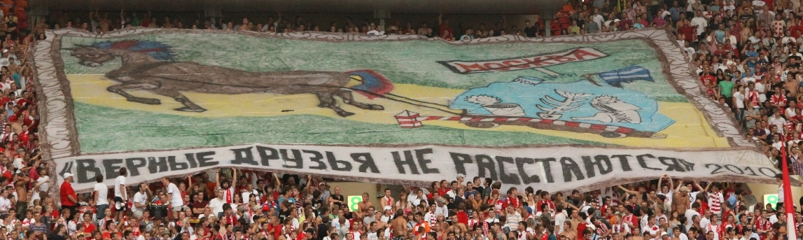 Баннер "Верные друзья не расстаются" на матче с ЦСКА. 2010 год